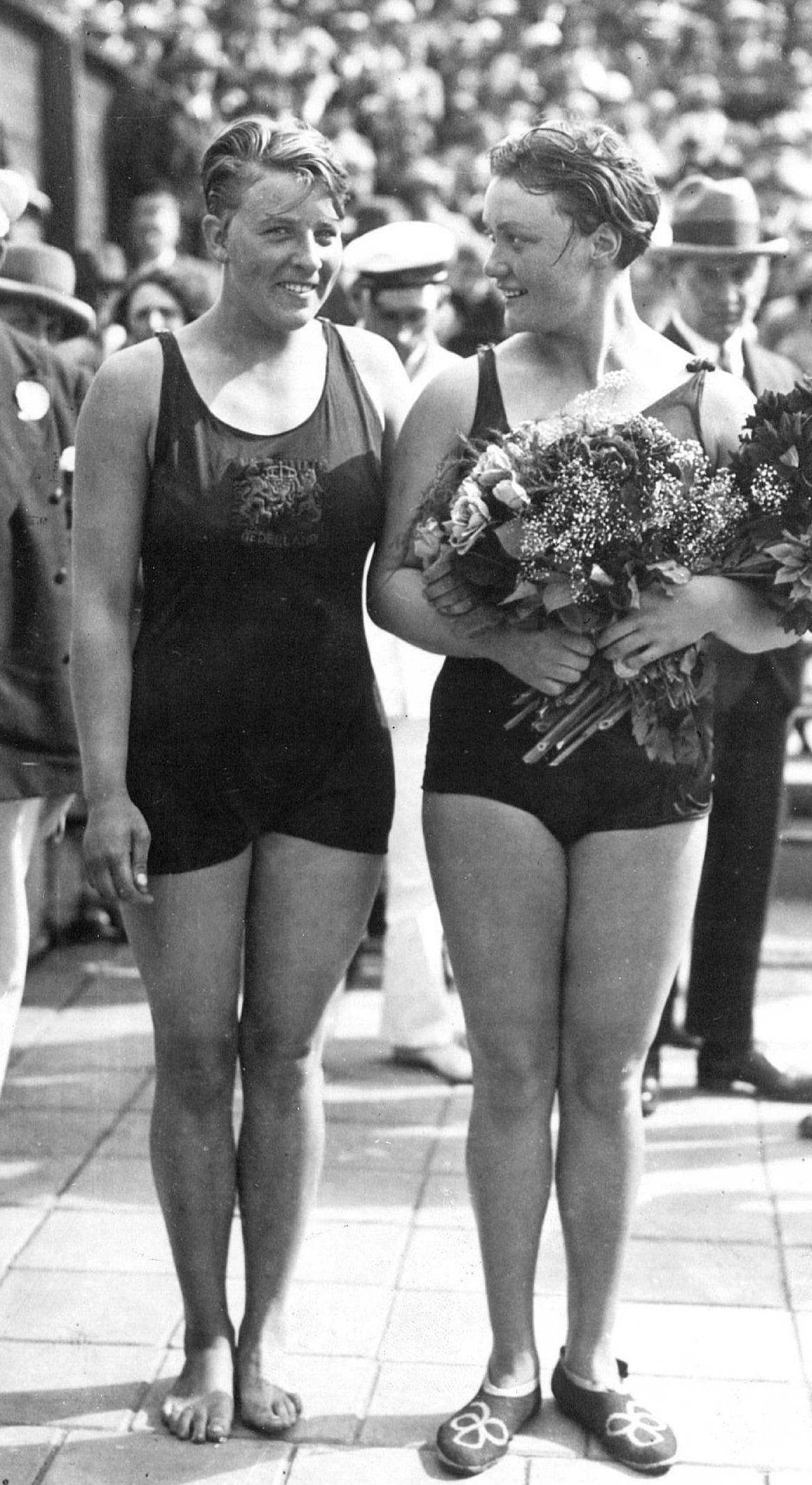 Olympische Spelen 1928 Amsterdam. Zwemsters 1928 Amsterdam. De Nederlandse Marie Baron en de Duitse Hildegard Schrader.